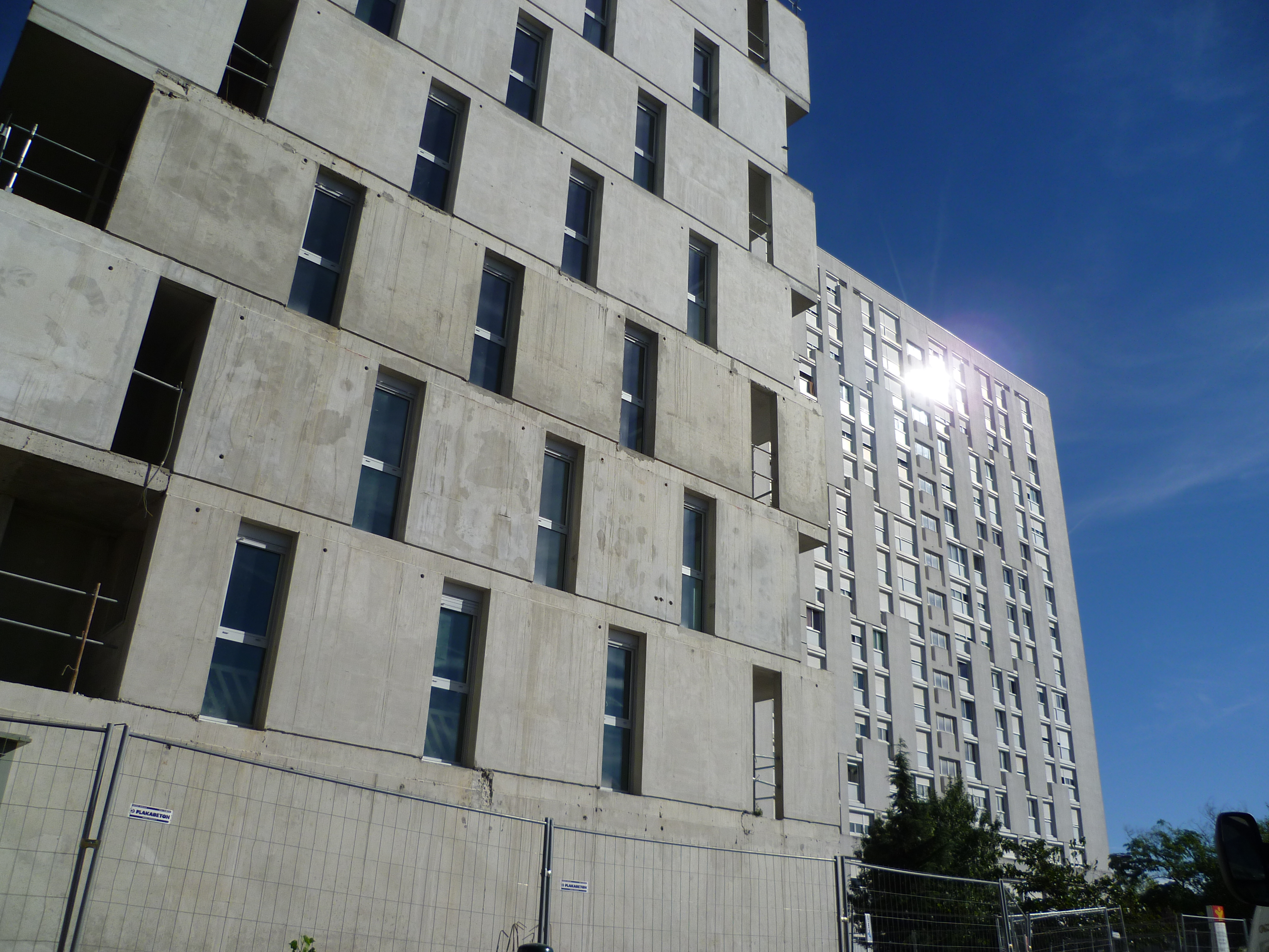 Avenue de Grande-Bretagne, nouveaux et anciens (années 1980 ?) immeubles modernes à Toulouse.